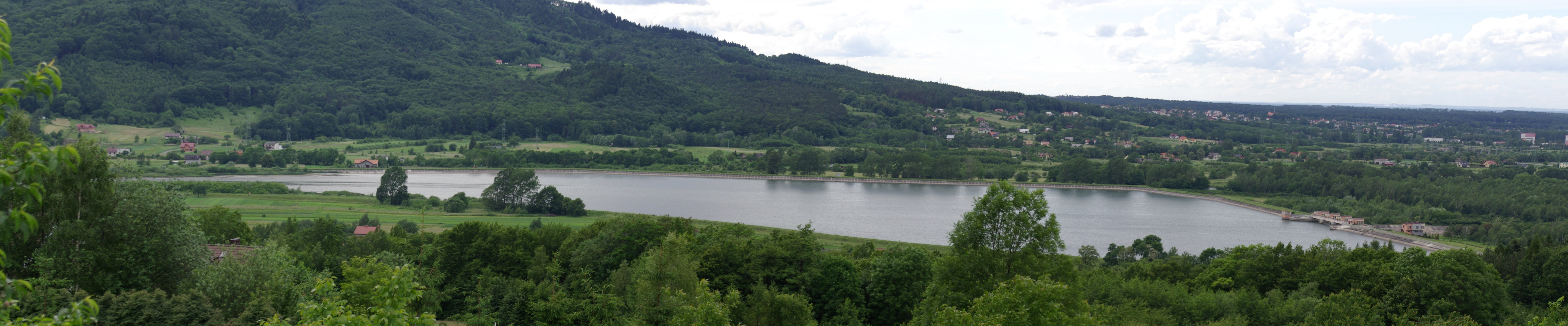 Zbiornik Czaniecki